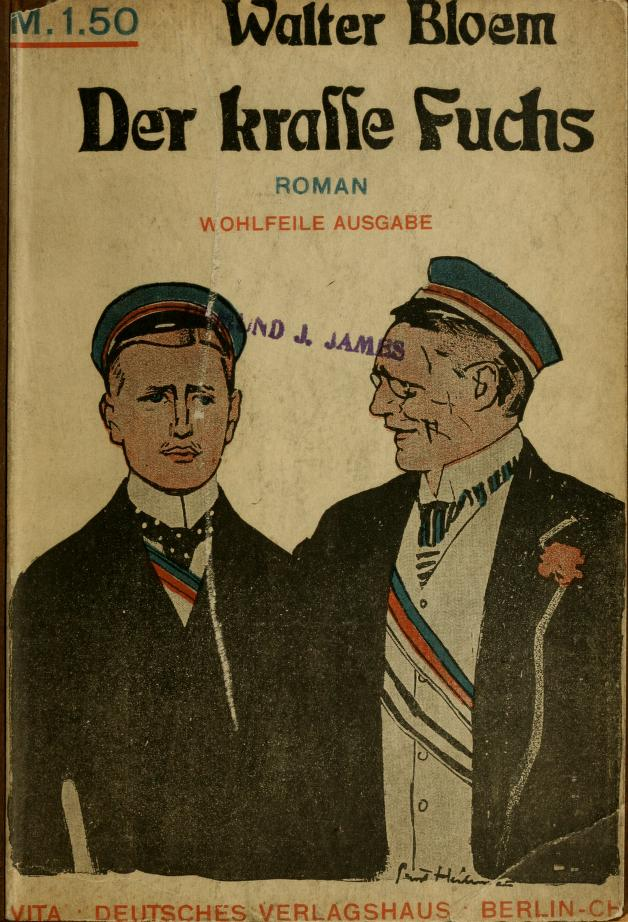 Der krasse Fuchs, Umschlag der Ausgabe des VITA-Verlags